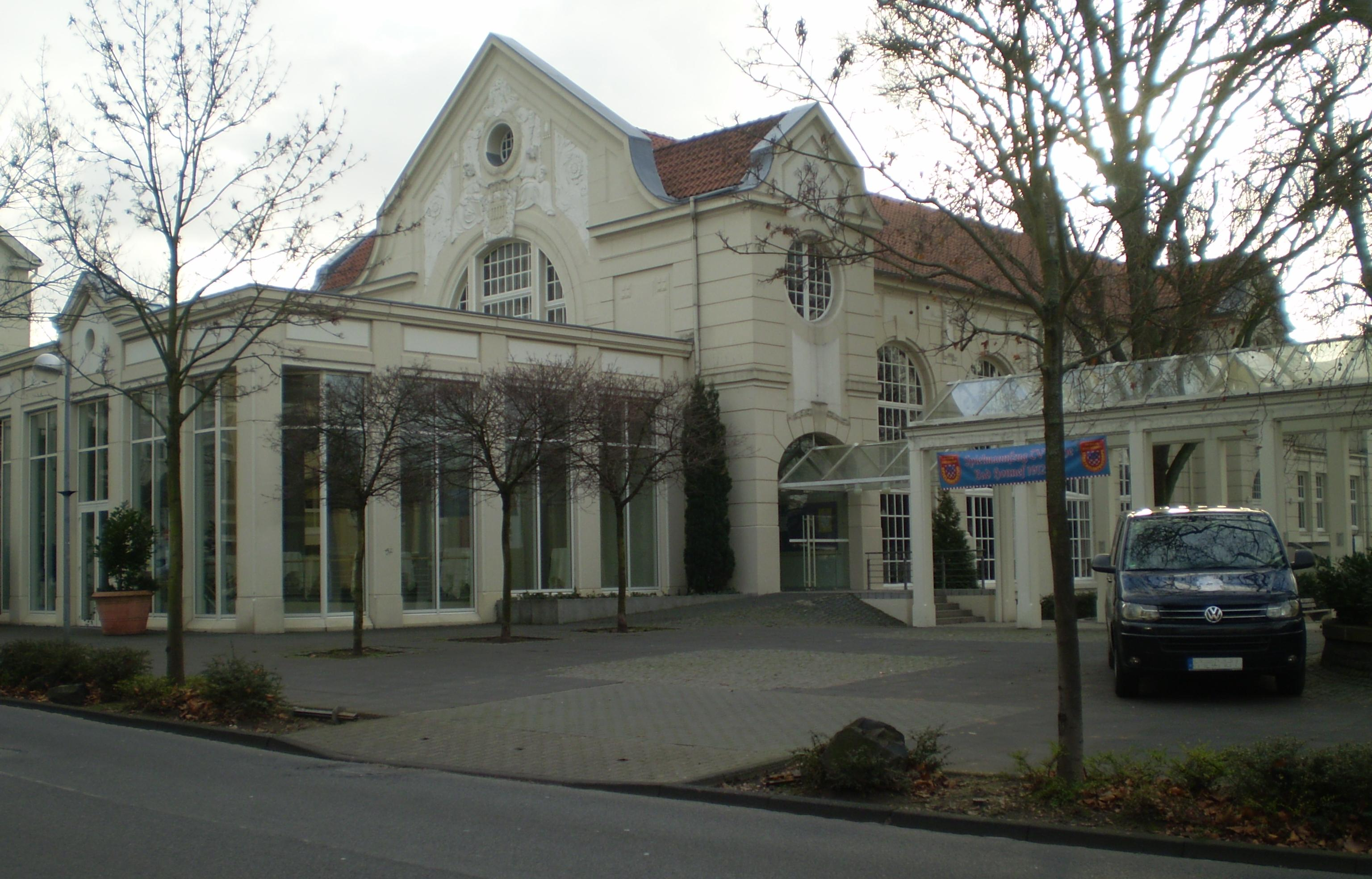 Kurhaus, Bad Honnef